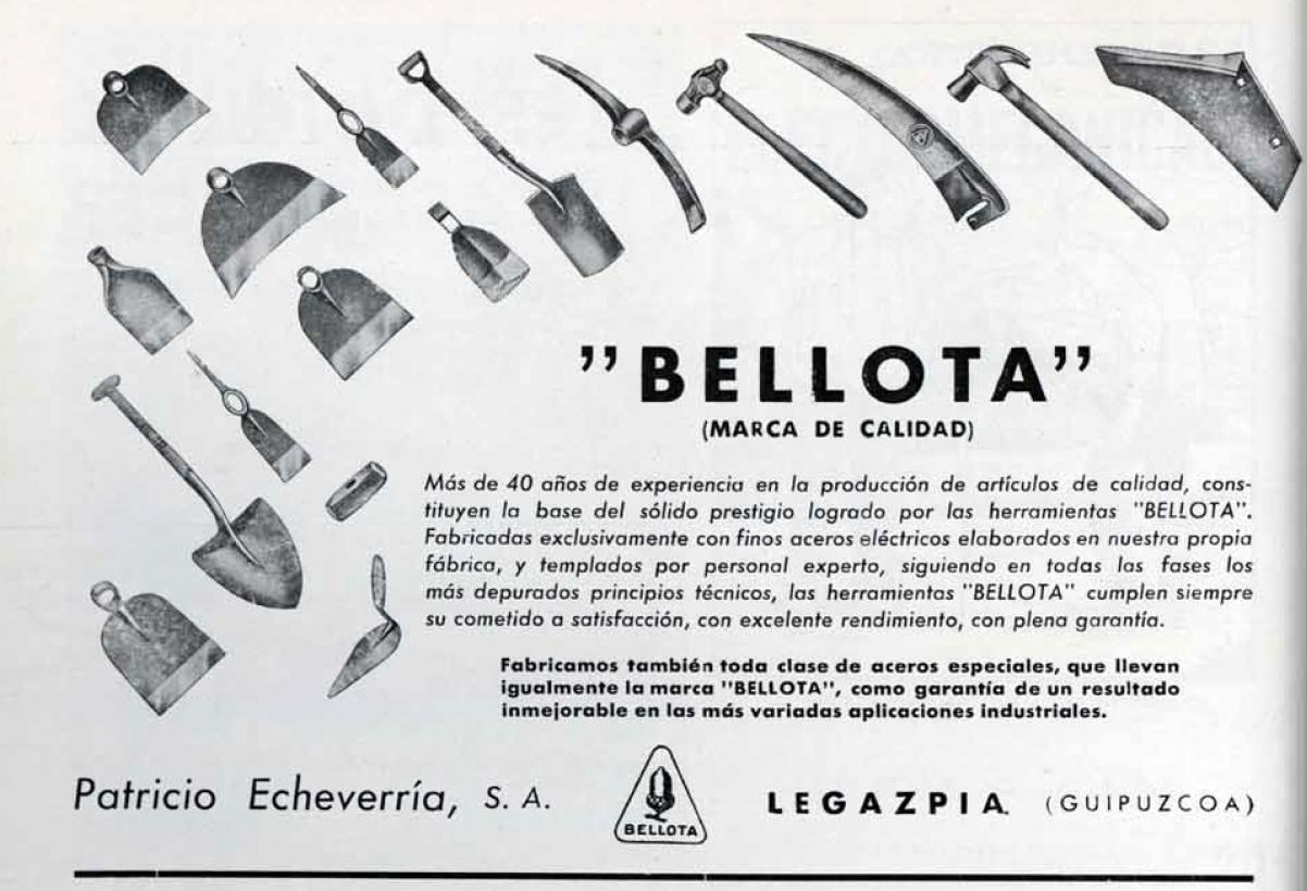 "BELLOTA" (MARCA DE CALIDAD) Más de 40 años de experiencia en la producción de artículos de calidad, constituyen la base del sólido prestigio logrado por las herramientas "BELLOTA". Fabricadas exclusivamente con finos aceros eléctricos elaborados en nuestra propia fábrica, y templados por personal experto, siguiendo en todas las fases los más depurados principios técnicos, las herramientas "BELLOTA" cumplen siempre su cometido a satisfacción, con excelente rendimiento, con plena garantía. Fabricamos también toda clase de aceros especiales, que llevan iguamente la marca "BELLOTA", como garantía de un resultado inmejorable en las más variadas aplicaciones industriales Patricio Echverría, S.A. LEGAZPIA (GUIPUZCOA)